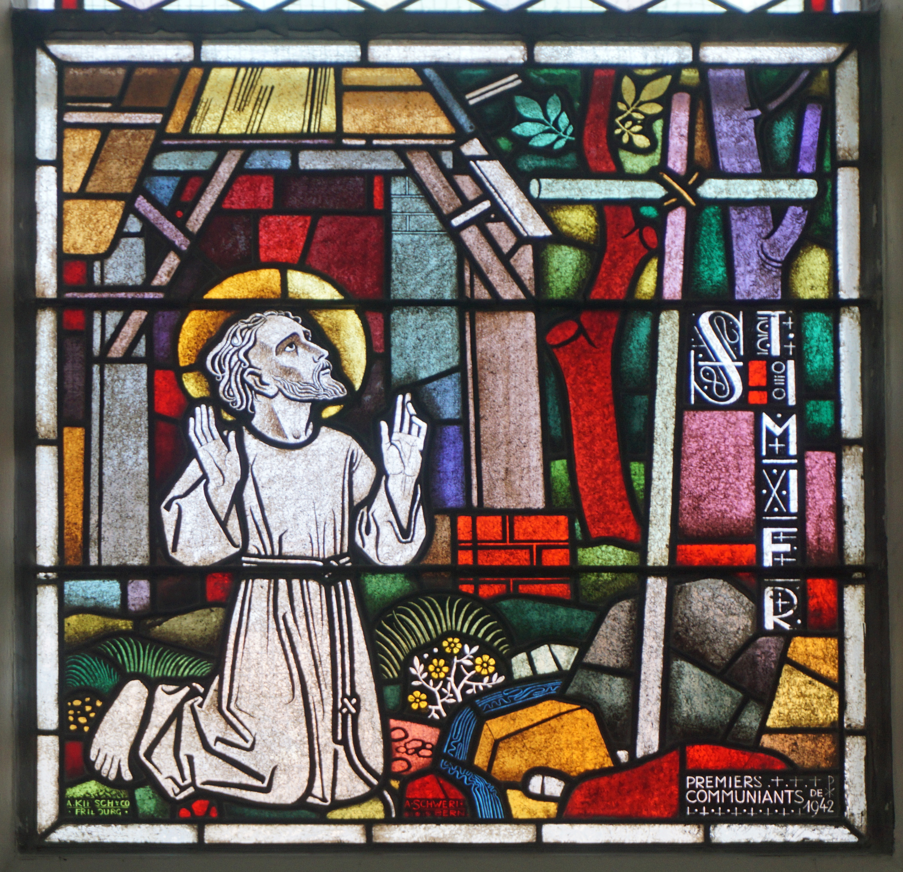 Fenster St. Imier. Entwurf Albin Schweri, Ausführung A. Kirsch&Cie. Fribourg